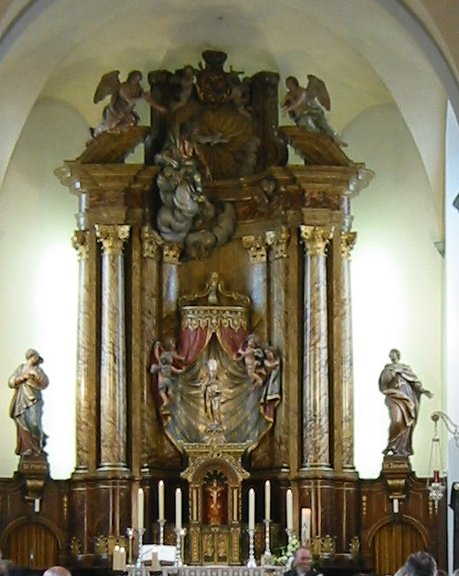 Der Altar in der Pfarrkirche St. Pankratius Nievenheim; Altar of the Curch St. Pankratius in Nievenheim, Dormagen, Germany